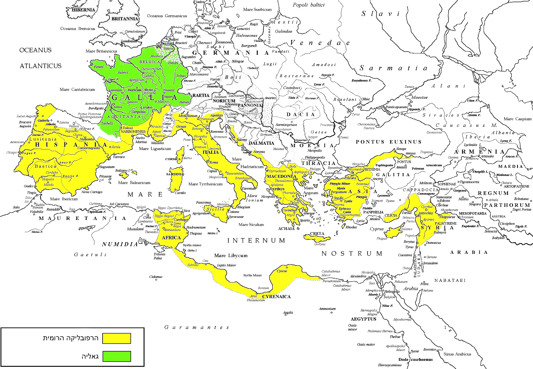 שינוי צבעים ומקרא